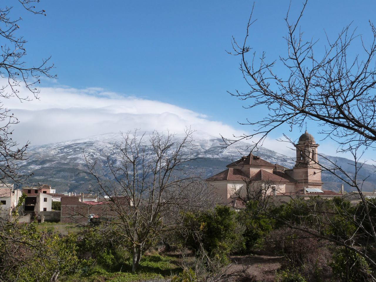 Iglesia de San Sebastián. Fue edificada en el Barrio Alto de Pinos del Valle a principios del siglo XIX sobre una antigua ermita construida en el siglo XVII. Contiene una obra en madera policromada representando al Cristo del Zapato, San Roque y San Sebastián, de muy hábil ejecución, realizada por el escultor granadino Domingo Sánchez Mesa.